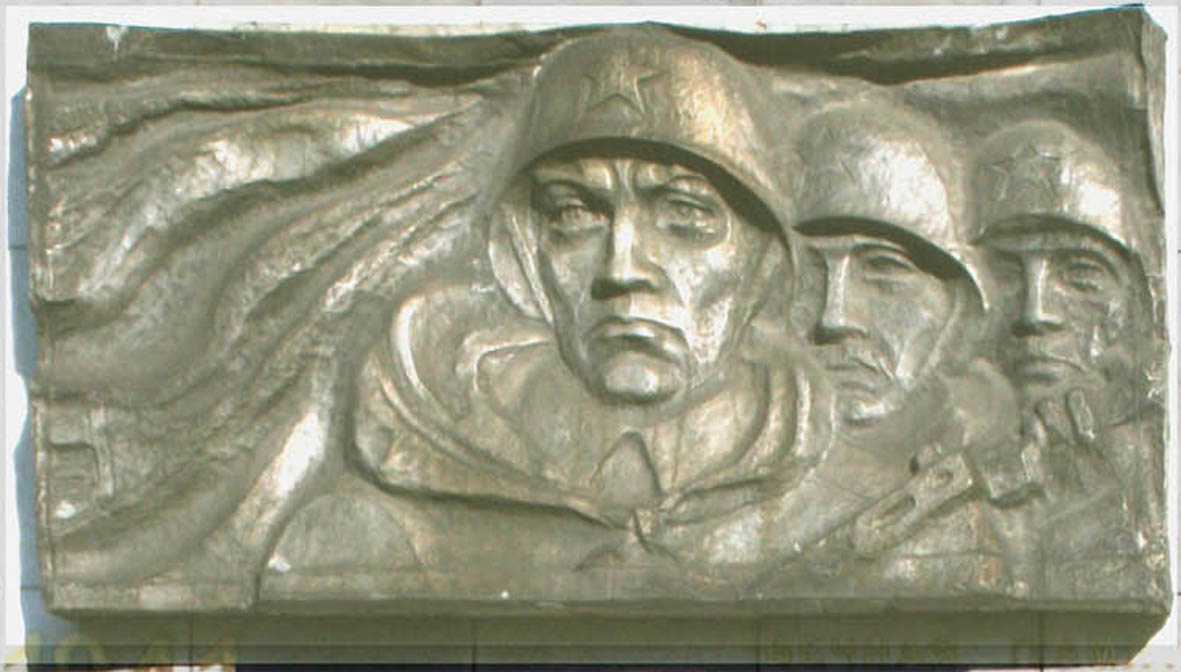 Барельеф для Стены Памяти